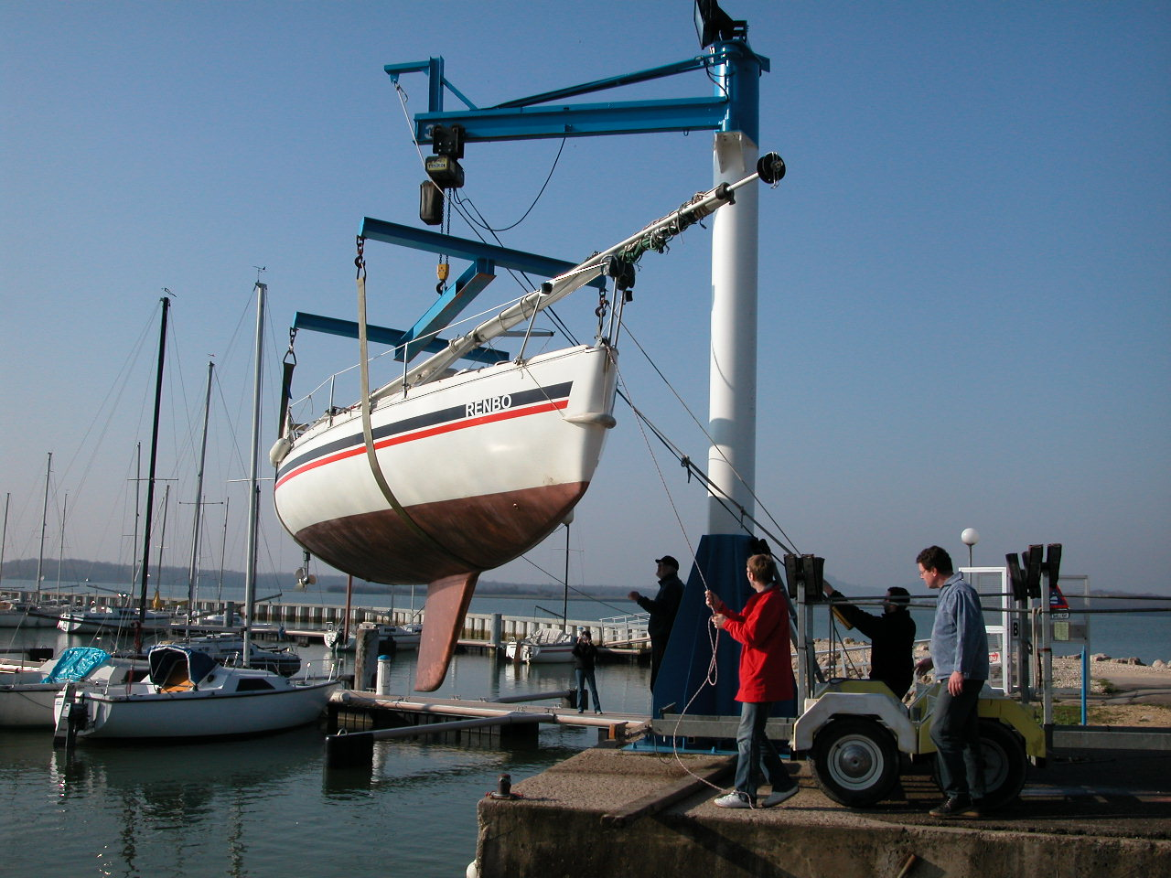 Segelboot am Kran, Lac de Madine, Frankreich, 1. April 2005 Quelle: fotografiert Fotograf: Renbo Lizenz: GFDL